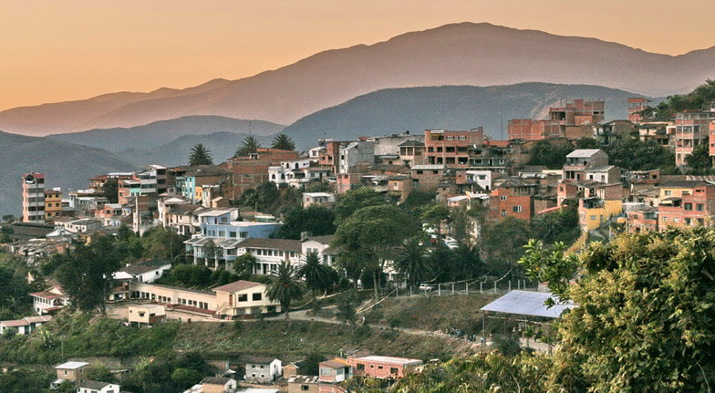 Coroico, Bolivia, Yungas, Tocana, Cotapata, Hotel Esmeralda